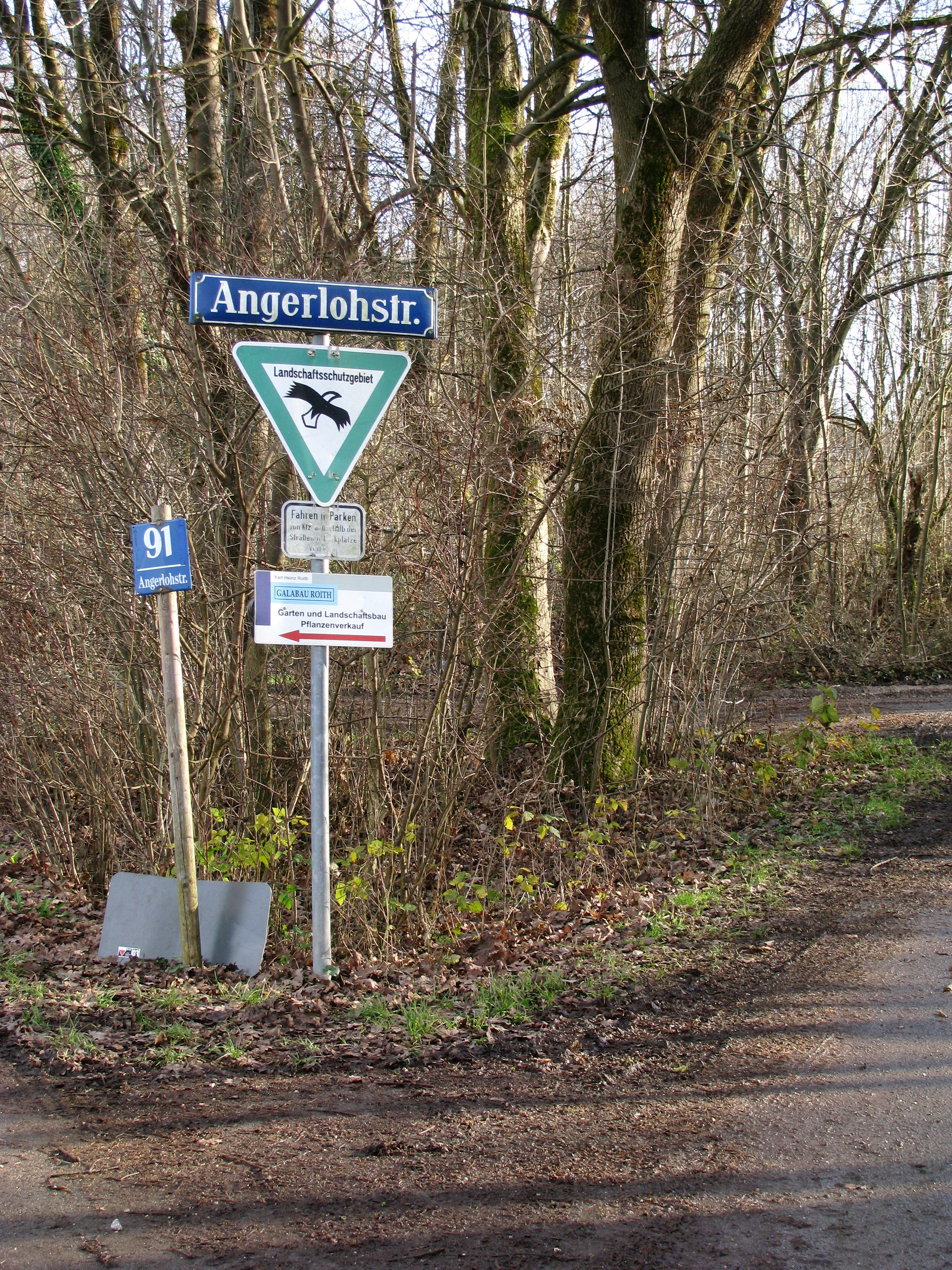 LSG Angerlohe in München